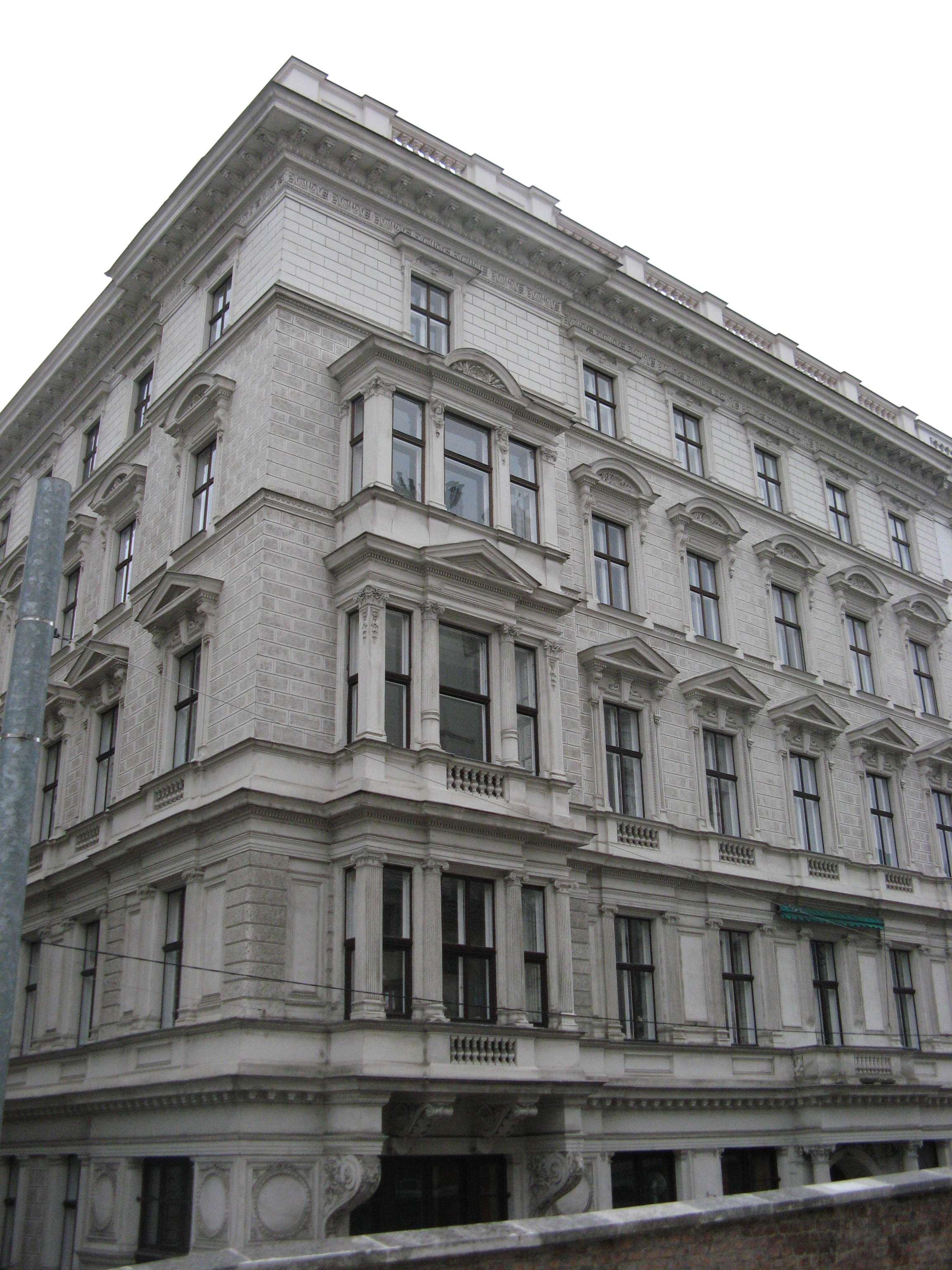 Haus Schreyvogelgasse 3 (1880) von Ludwig Tischler, Wien-Innere Stadt